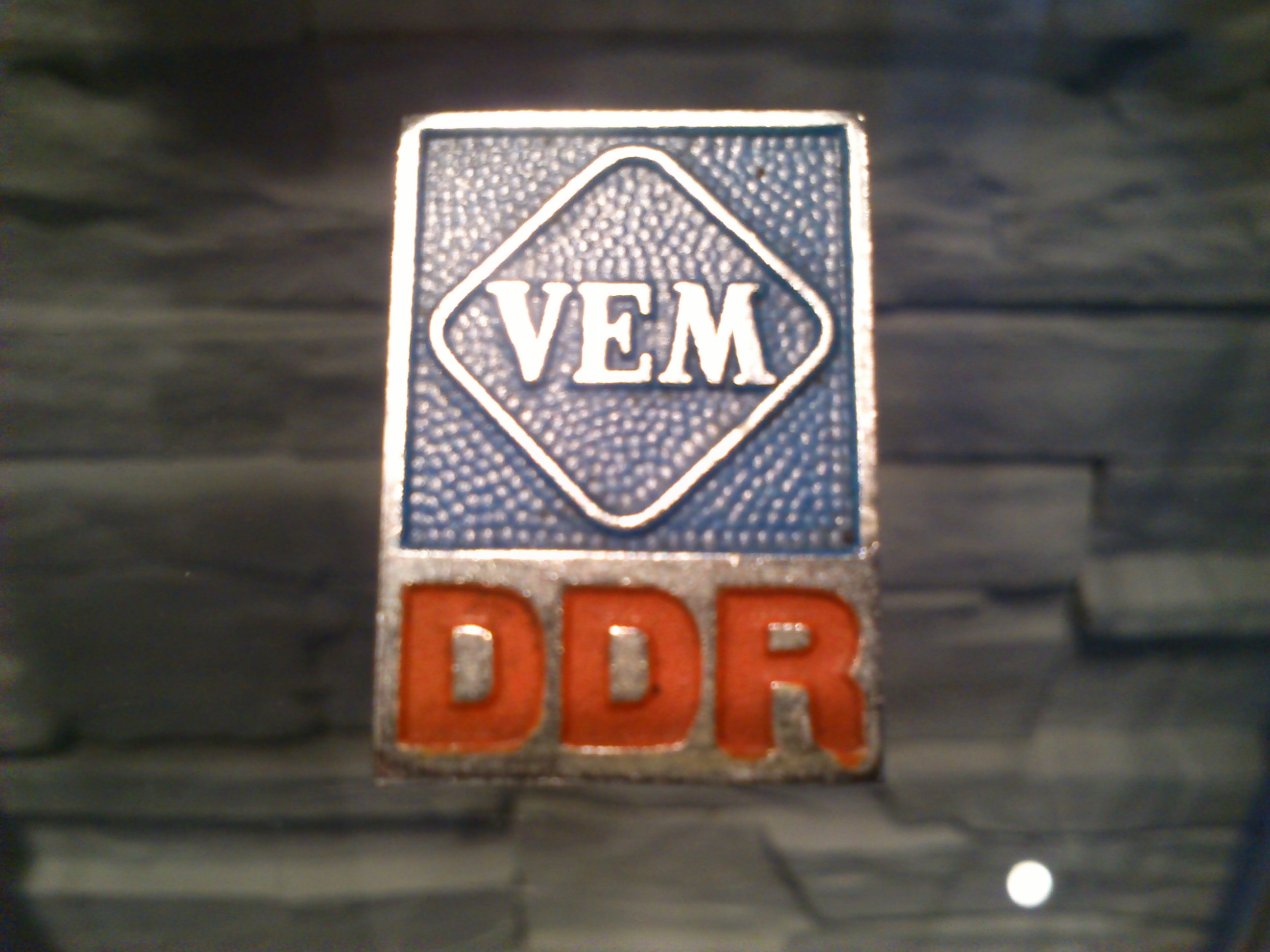 Muzeum Miniaturowej Sztuki Profesjonalnej Henryk Jan Dominiak, ul. Żwakowska 8 m 66 43-100 Tychy - znaczek VEM DDR .